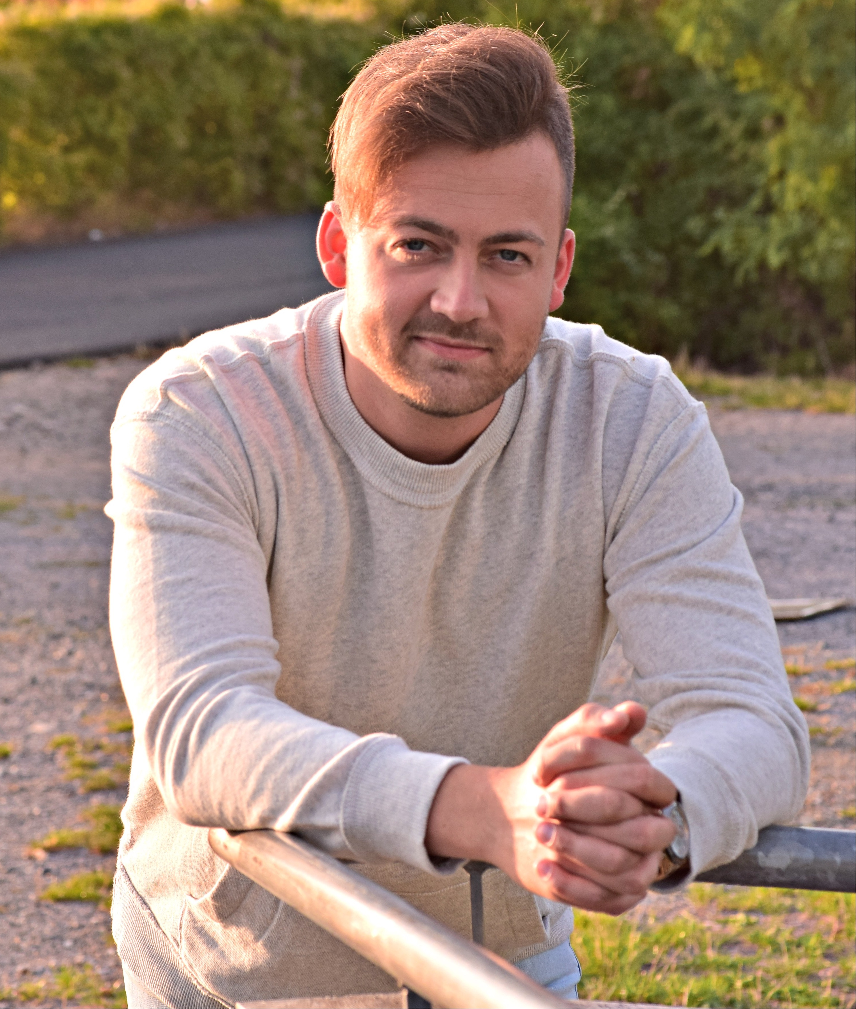 Thomas Adamek im Jahr 2018